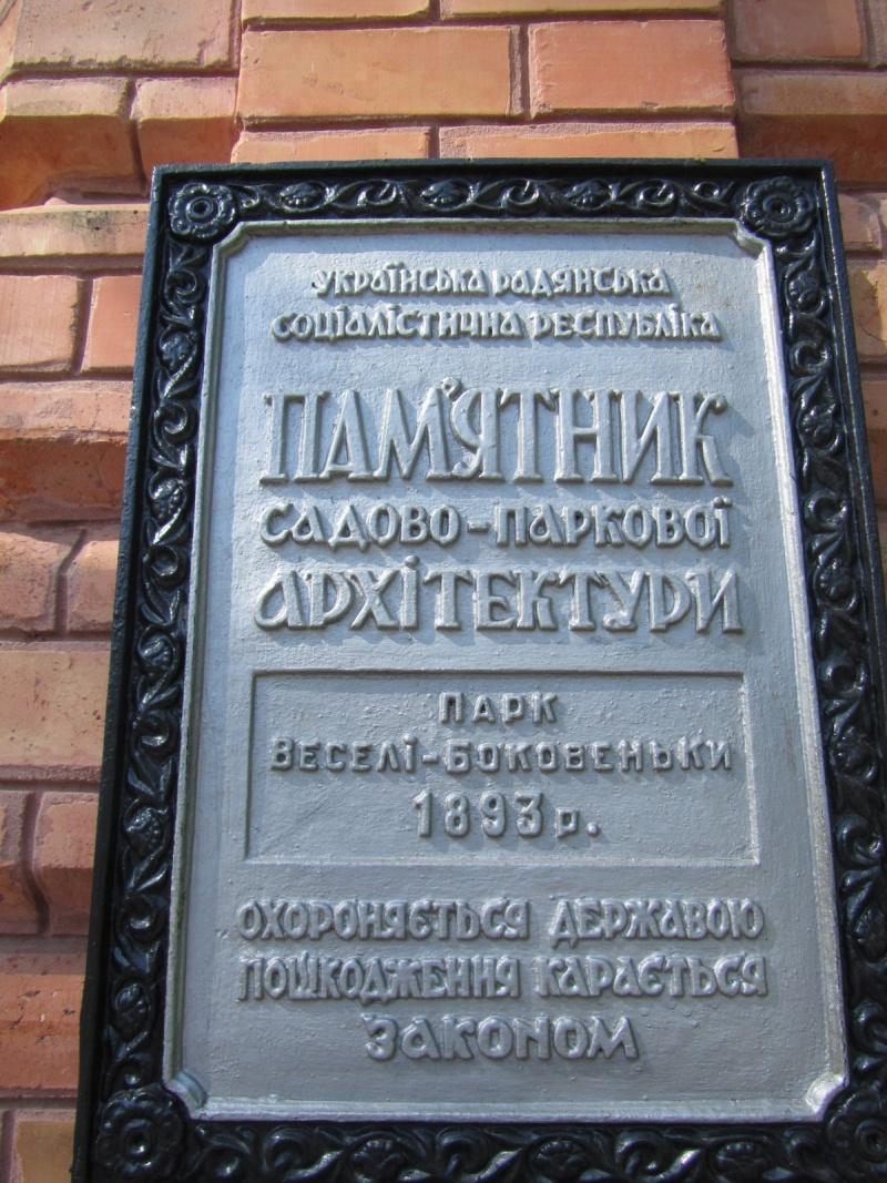 Памятник садово-паркової архітектури